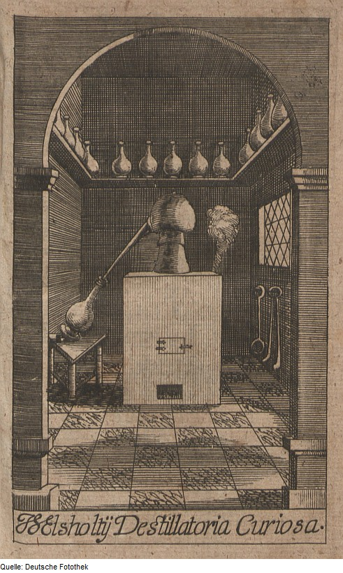 Original image description from the Deutsche FotothekAlchemie & Destillation & Ofen